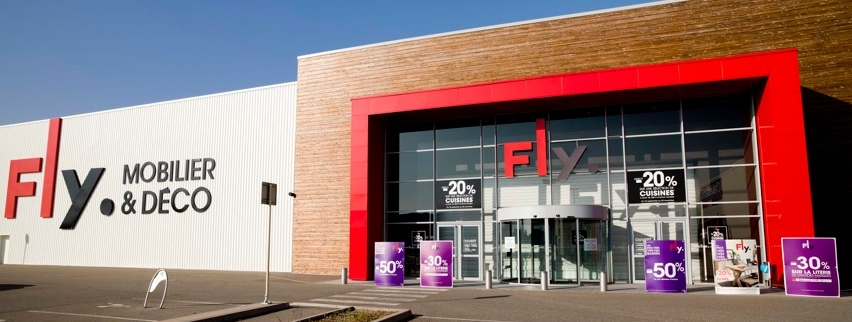 A FLY's shop in Kingersheim